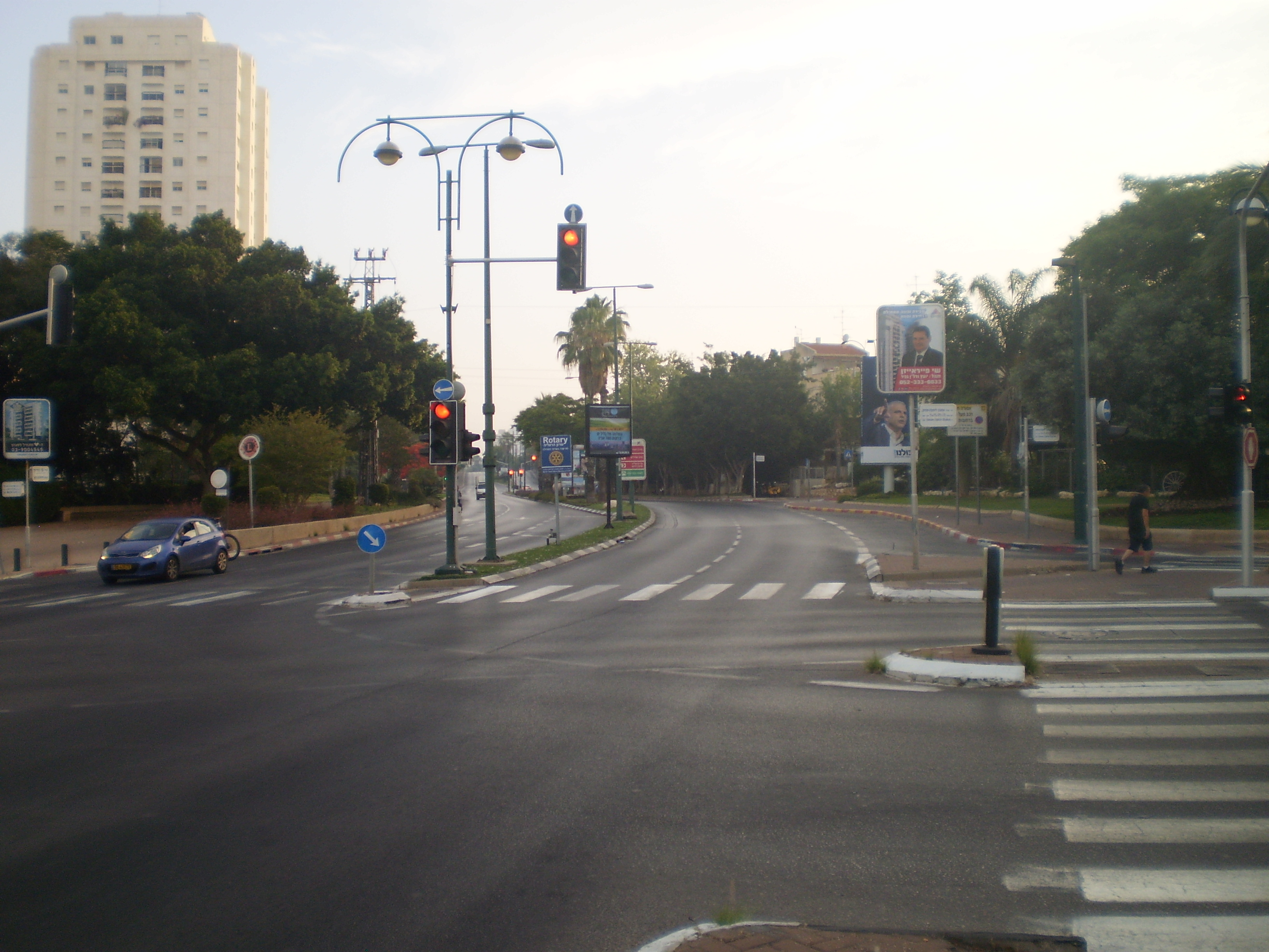 הקצה הדרומי של שדרות בן גוריון, הרצליה